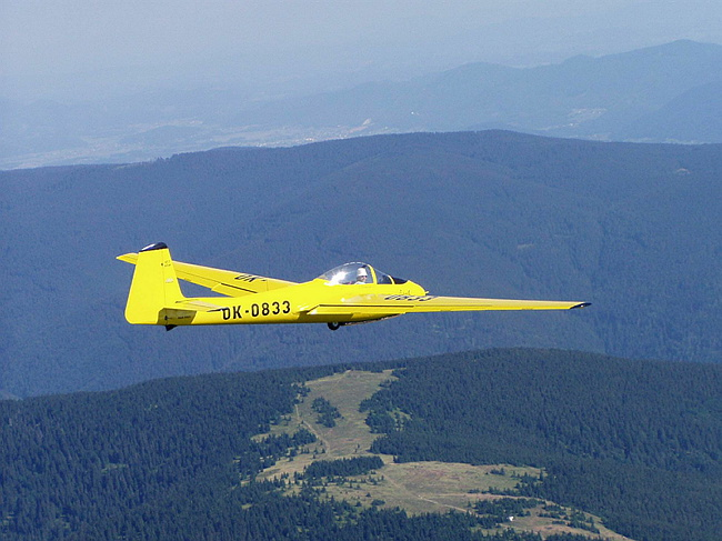 Lunak OK-0833 in Slowenien